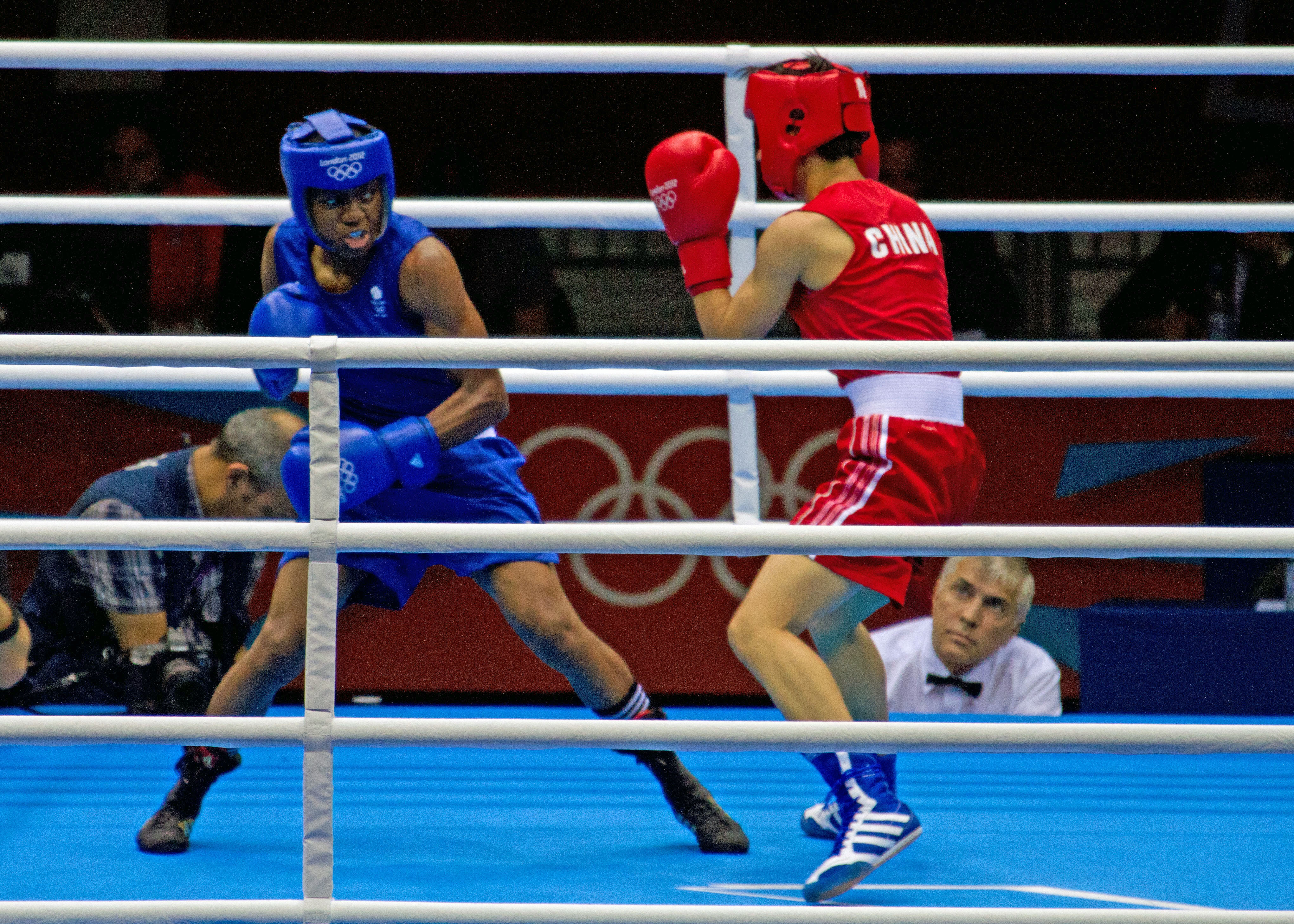 Nicola Adams v Cancan Ren, London 2012